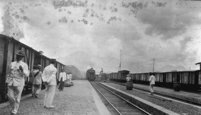 Foto. Treinen op het station van Tjibatoe, West-Java